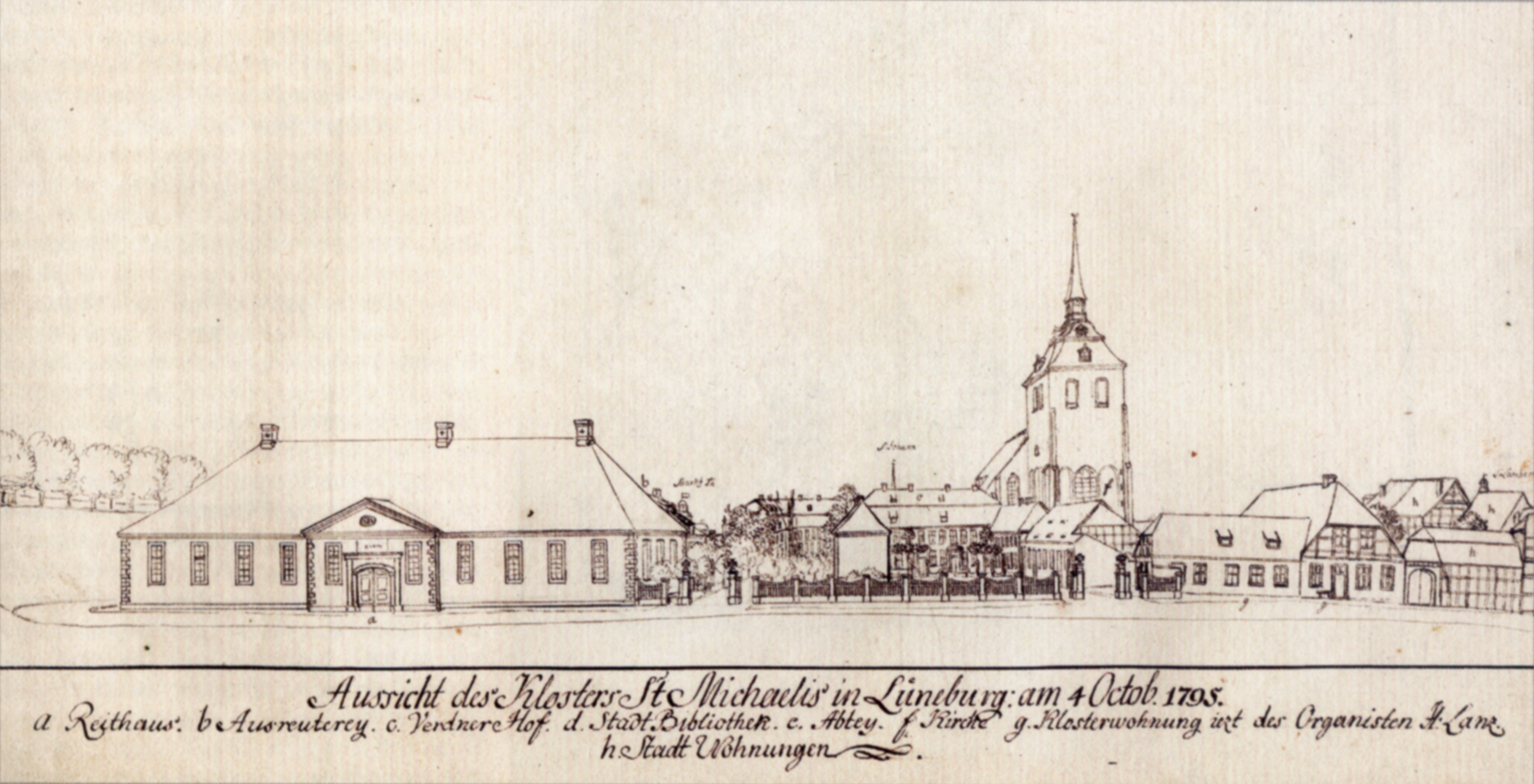 Ansicht des Klosters St. Michaelis in Lüneburg am 4. Octob. 1795 (links die Reithalle der Ritterakademie), Zeichnung von Ludwig Albrecht Gebhardi (Collectanea), 1795 Gottfried-Wilhelm-Leibniz-Bibliothek, Hannover, Ms. XXIII, 849, Bd. 2, Bl. 189